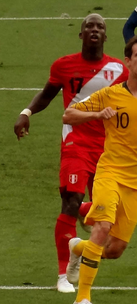 Luis Advíncula en Rusia 2018